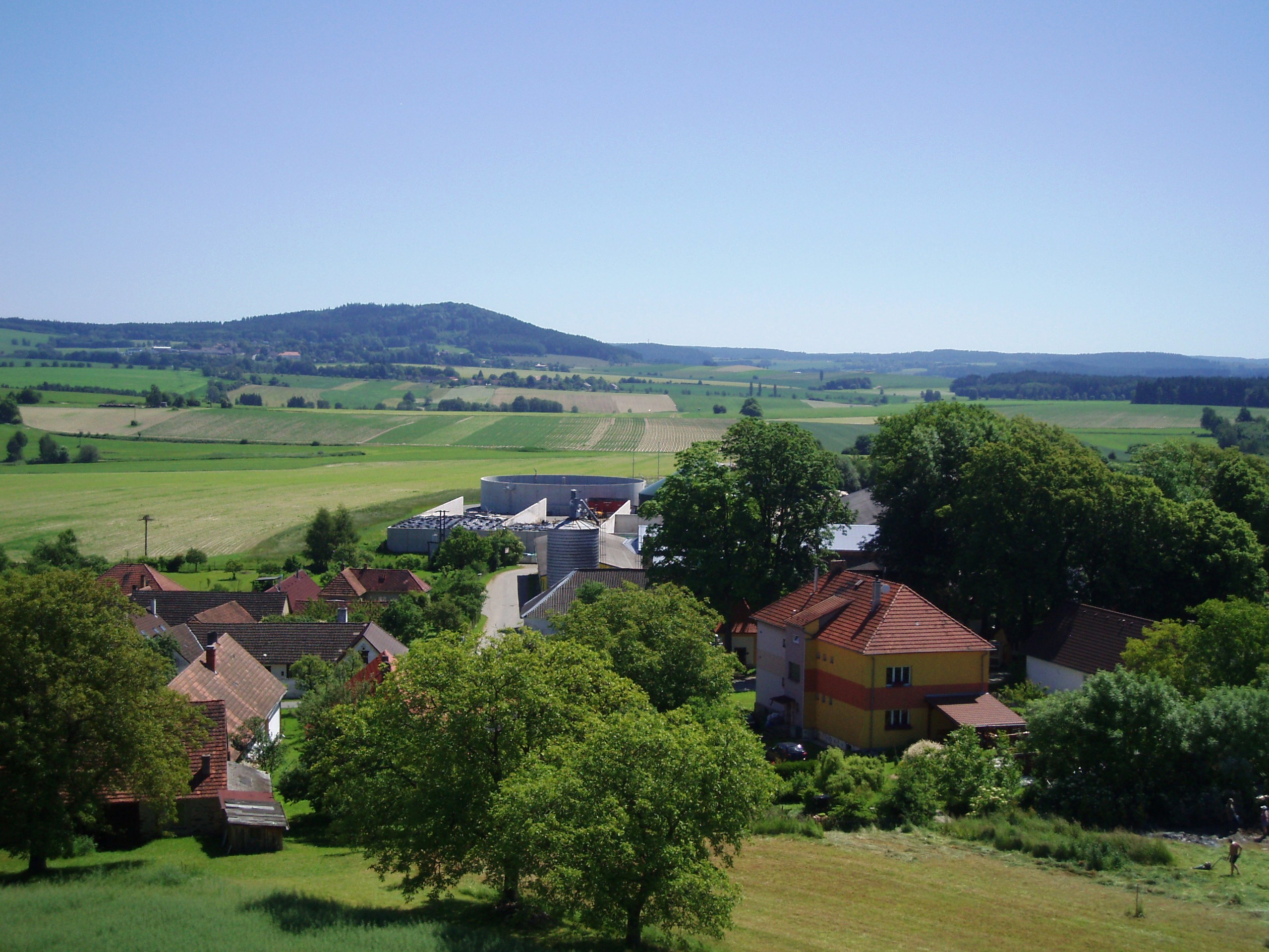 Krátošice z rozhledny.V pozadí vrch Choustník